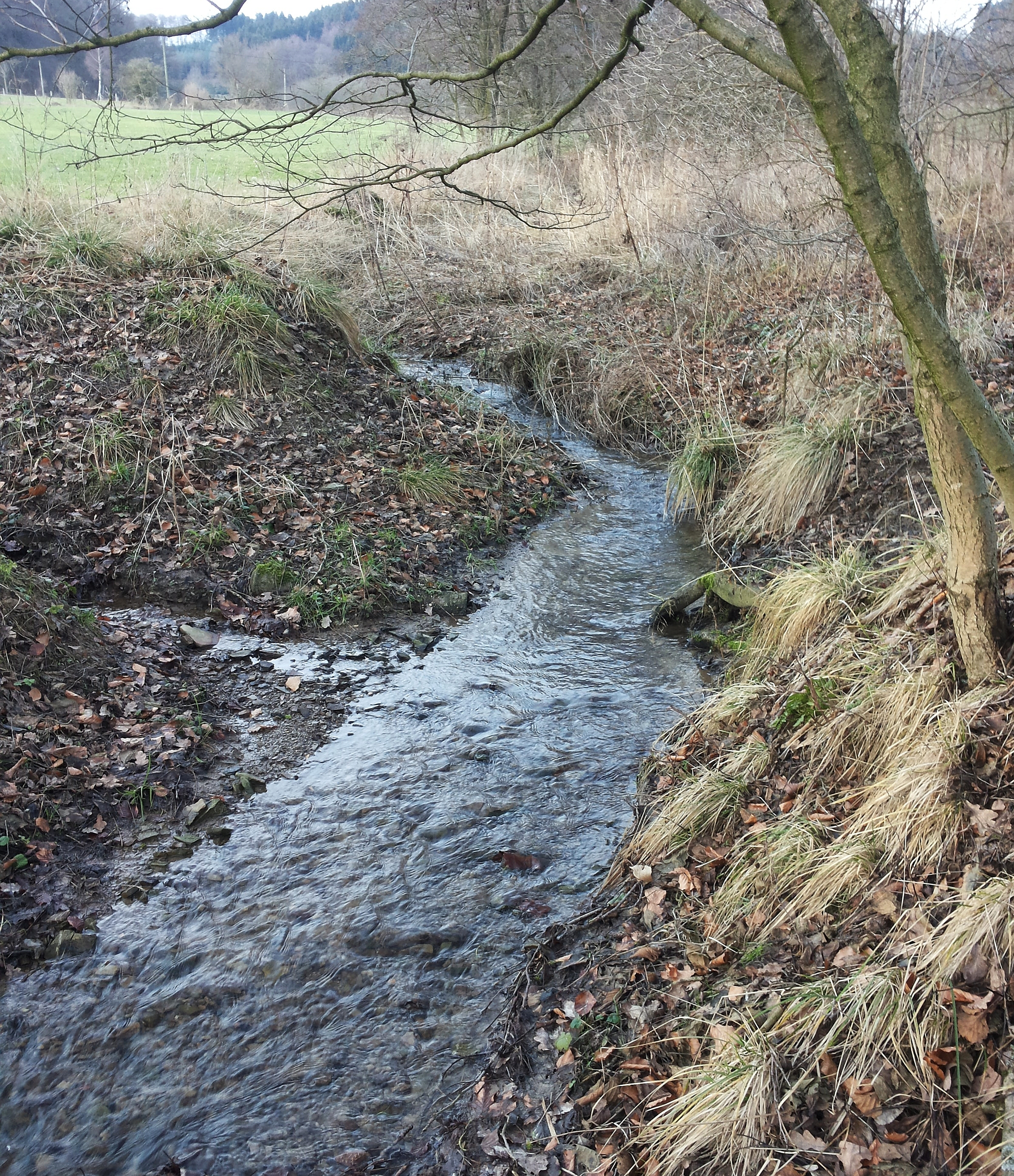 Hardtsiepen (Nebenfluss der Arpe) bei Schmallenberg-Keppel (Germany)